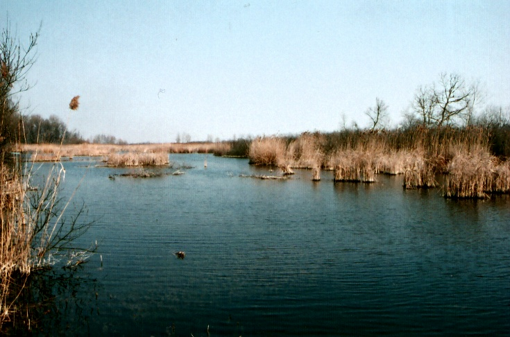 Vajai tó